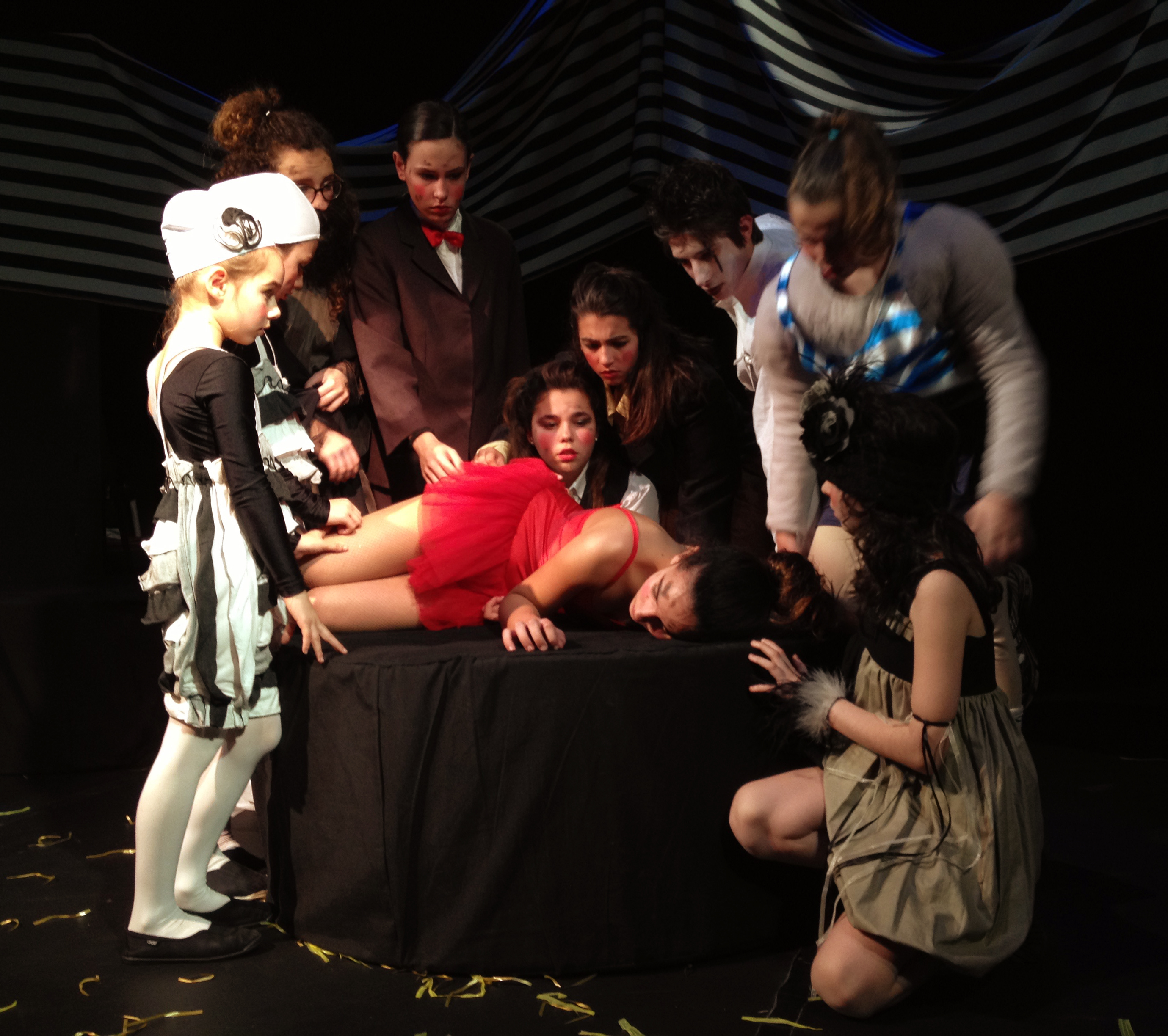 La escuela de teatro Dinámica Teatral interpretando la obra 'Carrusel' de A. Rizzo en la Sala Porta4 en el marco del VI Festival MUTIS de teatro independiente de Barcelona.